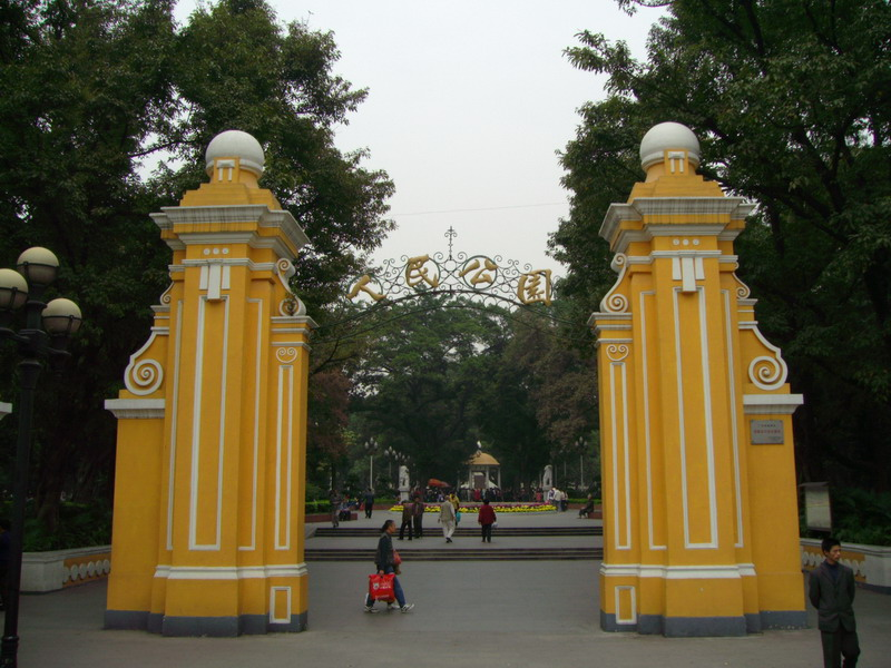 广州人民公园正门